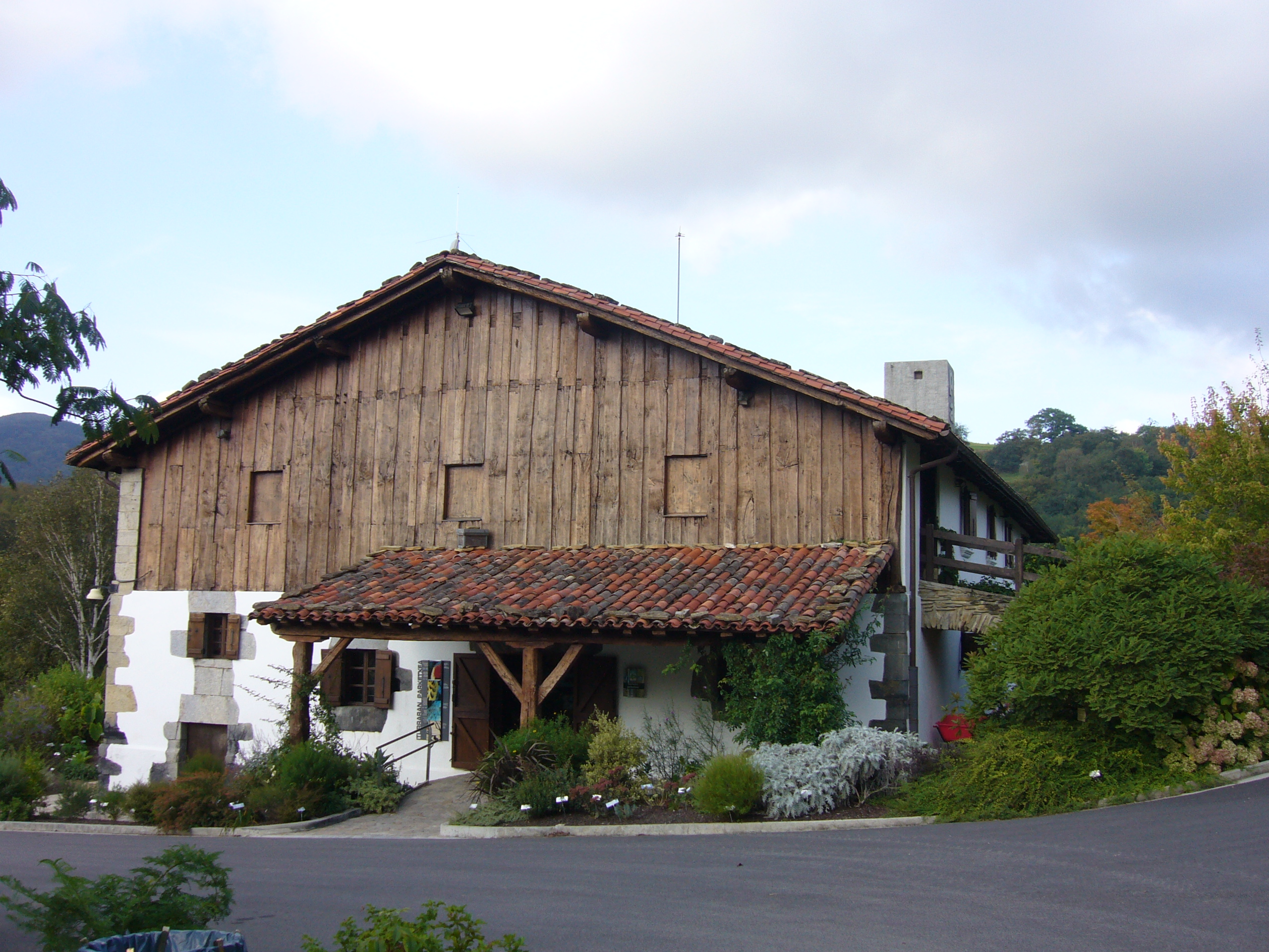 Pagoetako Parke Naturaleko harrera etxea, Iturraran